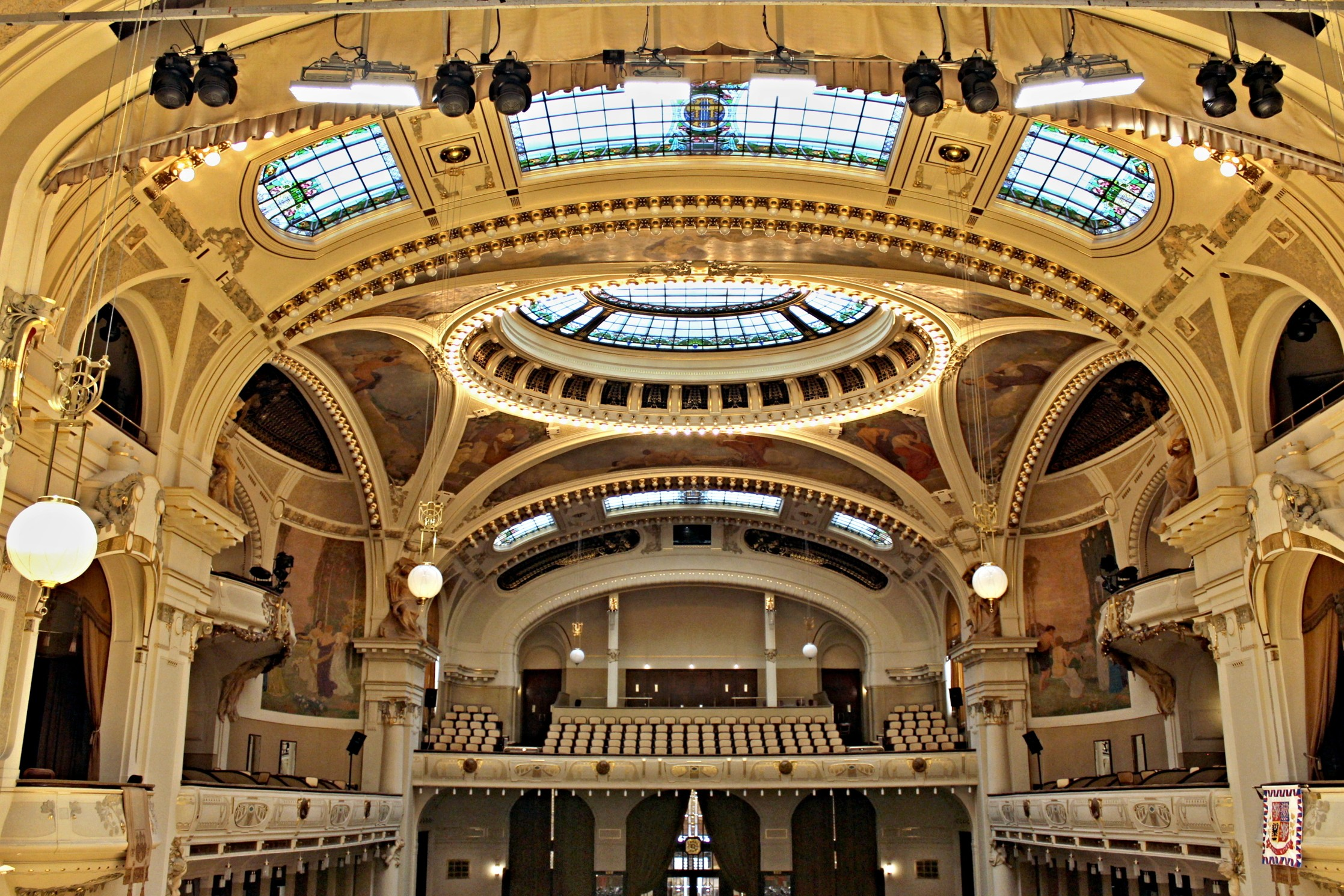 Interiér Smetanovy síně Obecního domu, Praha